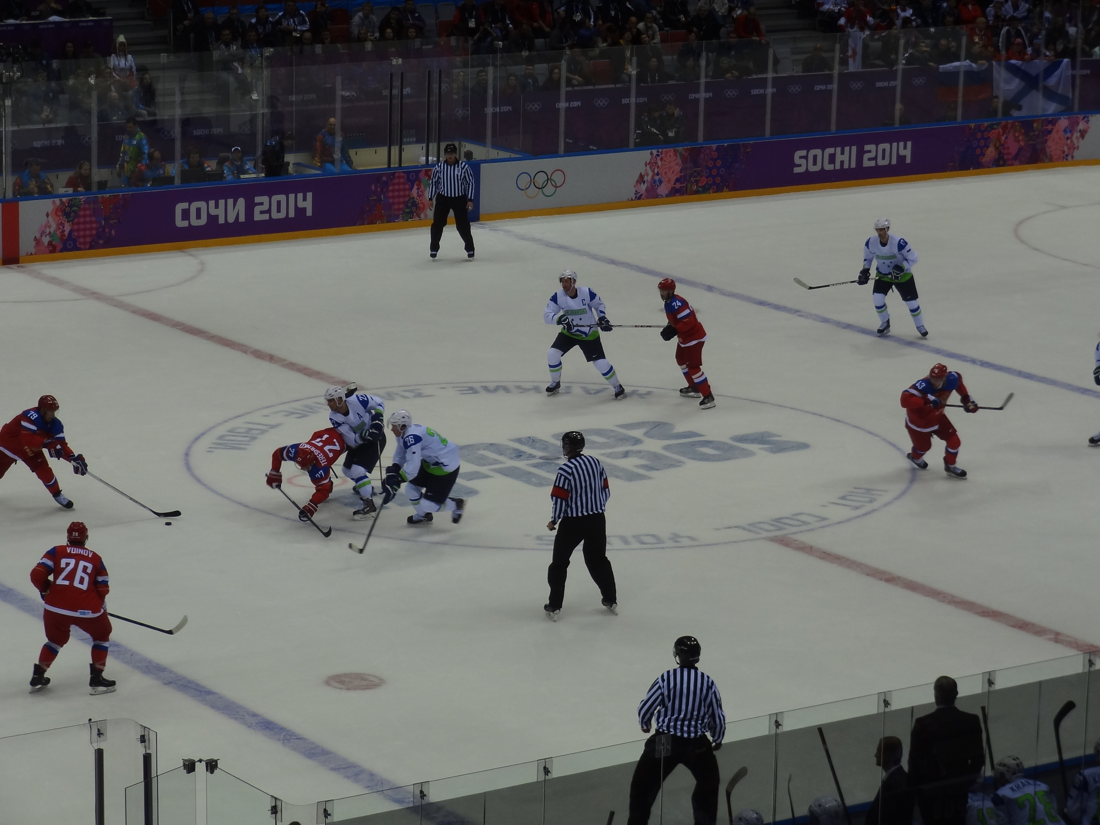 Сочи-2014. Хоккей, Россия — Словения, 5:2.